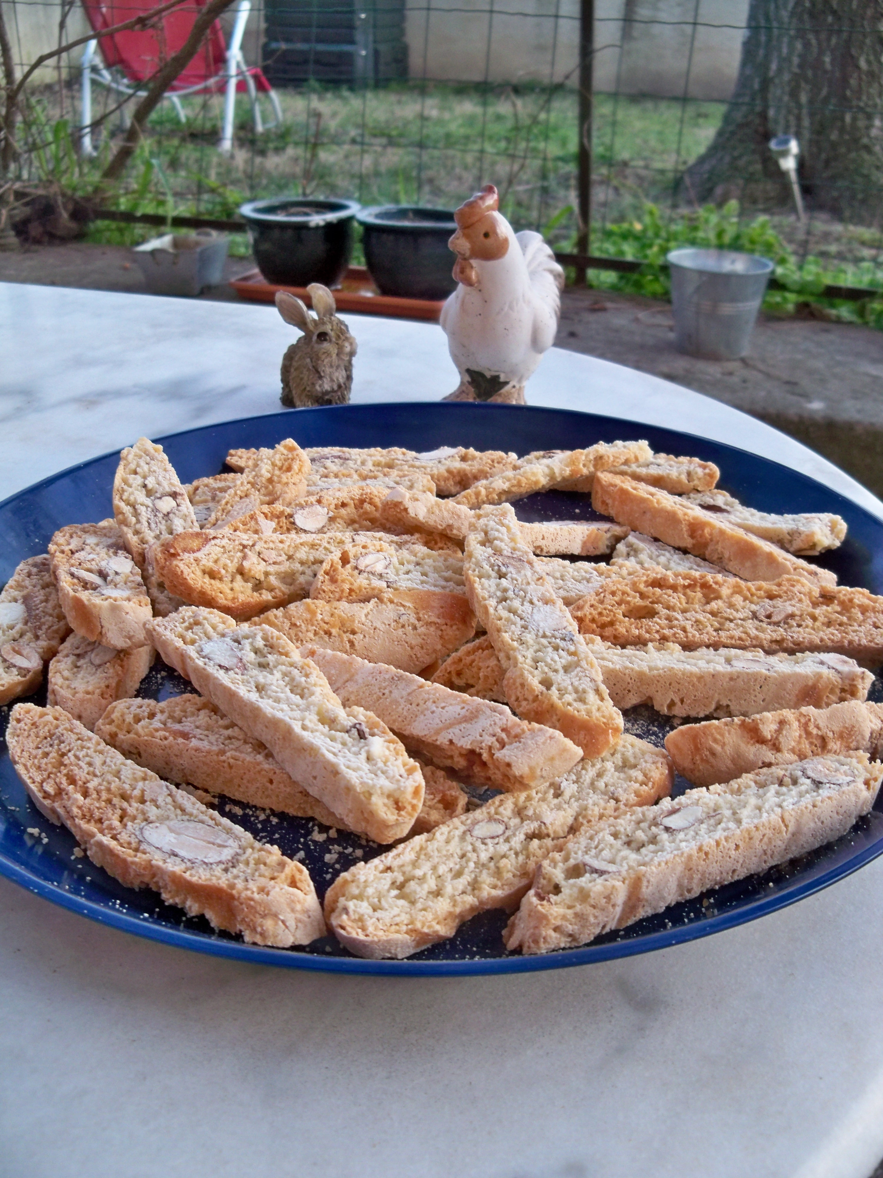 pâtisserie provençale